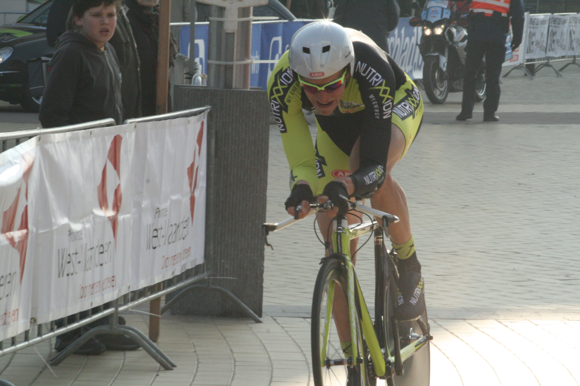 Driedaagse van West-Vlaanderen 2011, proloog in Middelkerke